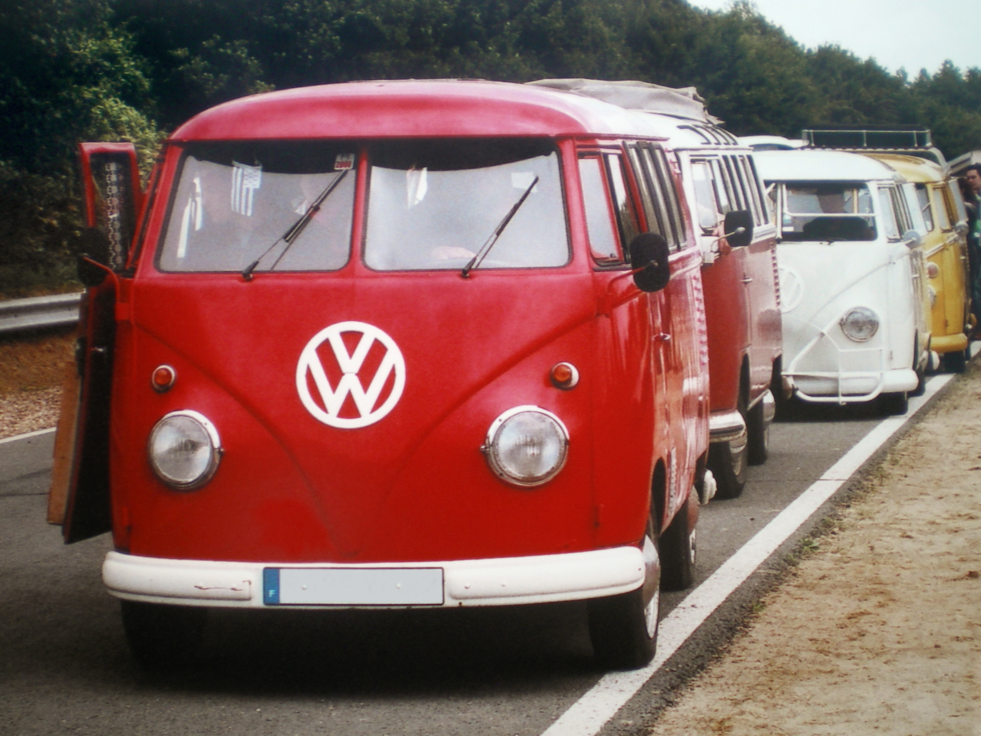 Un Volkswagen Combi Split Samba à la tête de ses semblables lors d'un meeting de collectionneurs.